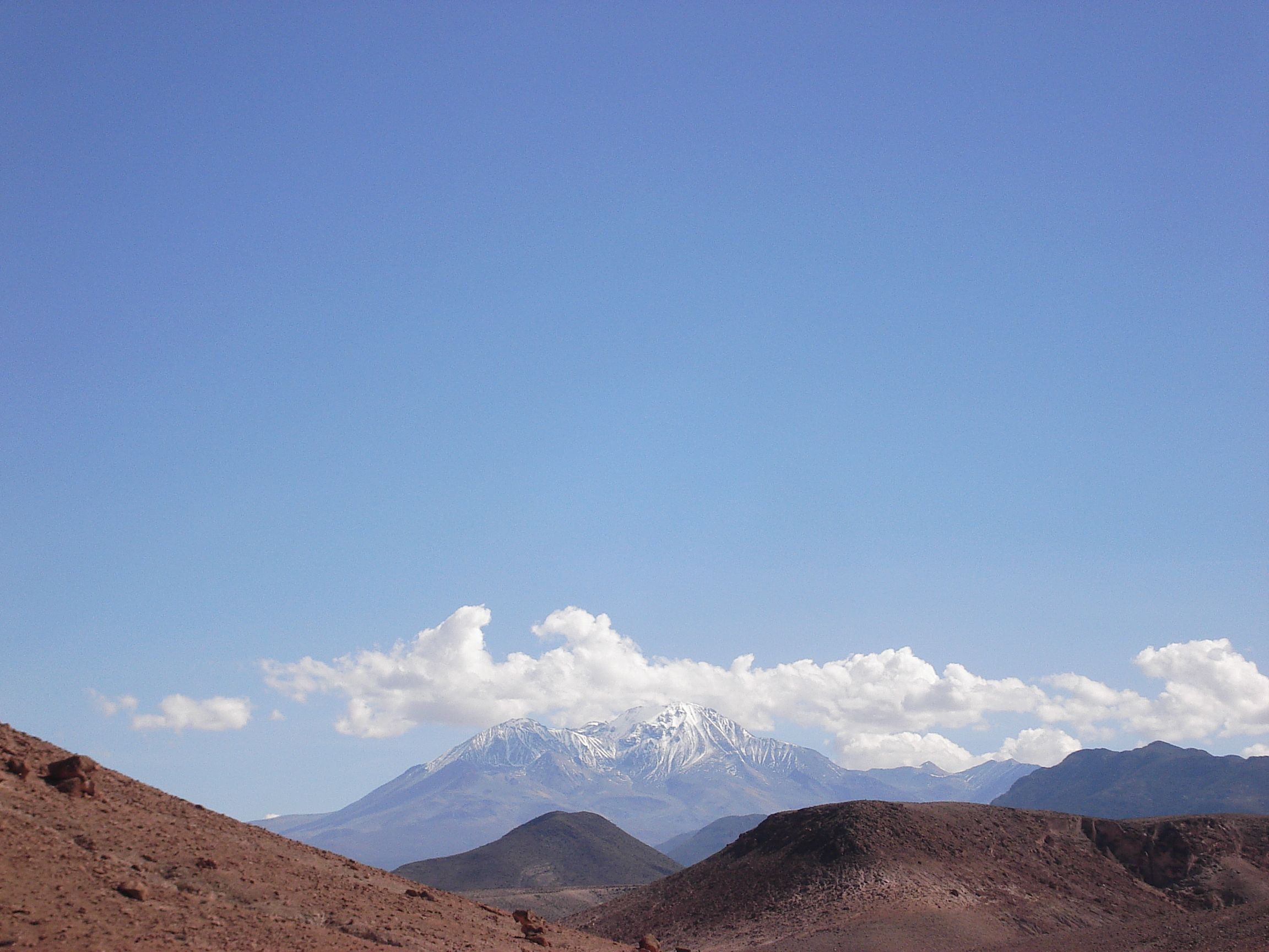 Foto tirada por mim, em Arica.